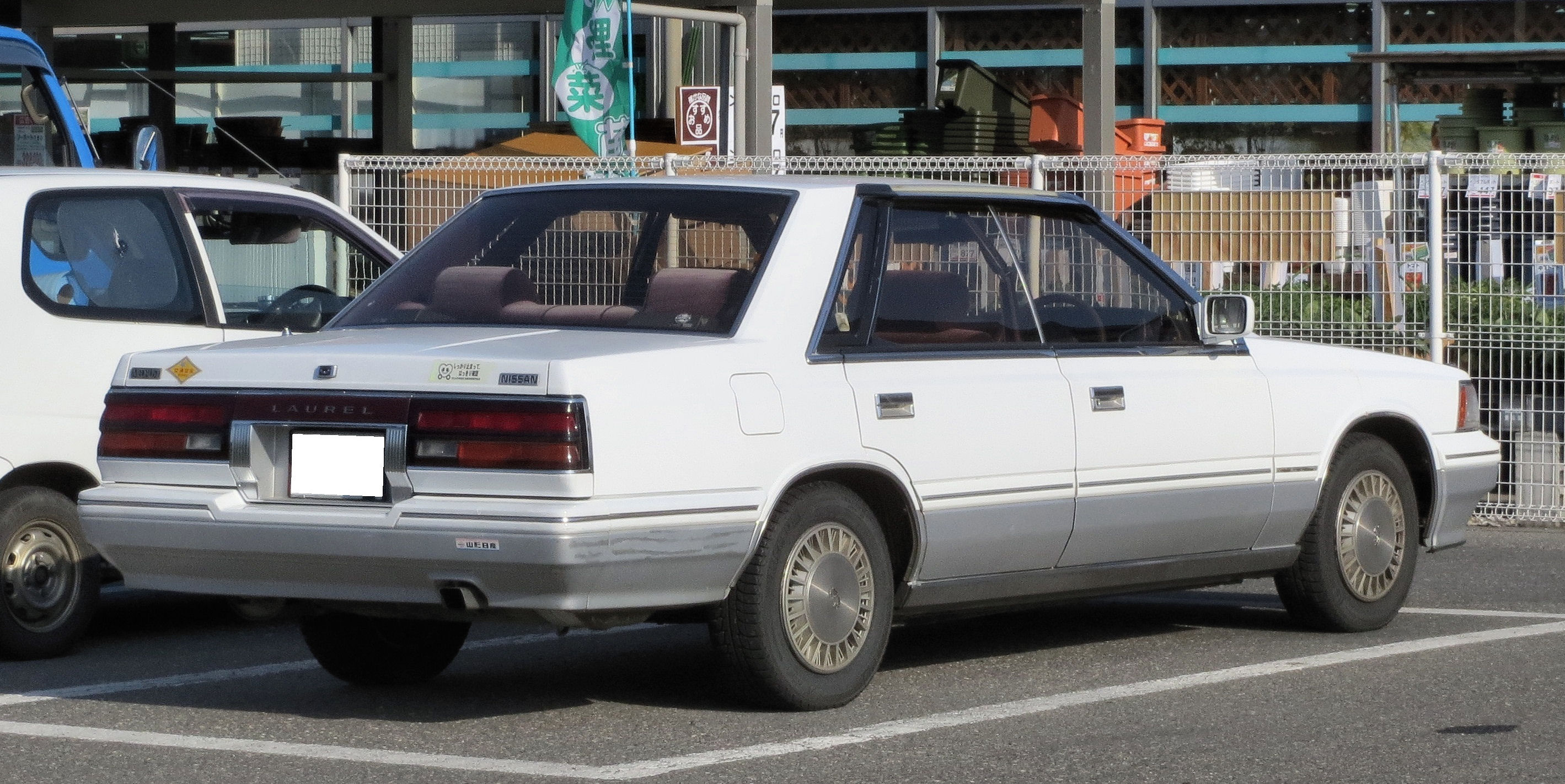 日産ローレル メダリスト